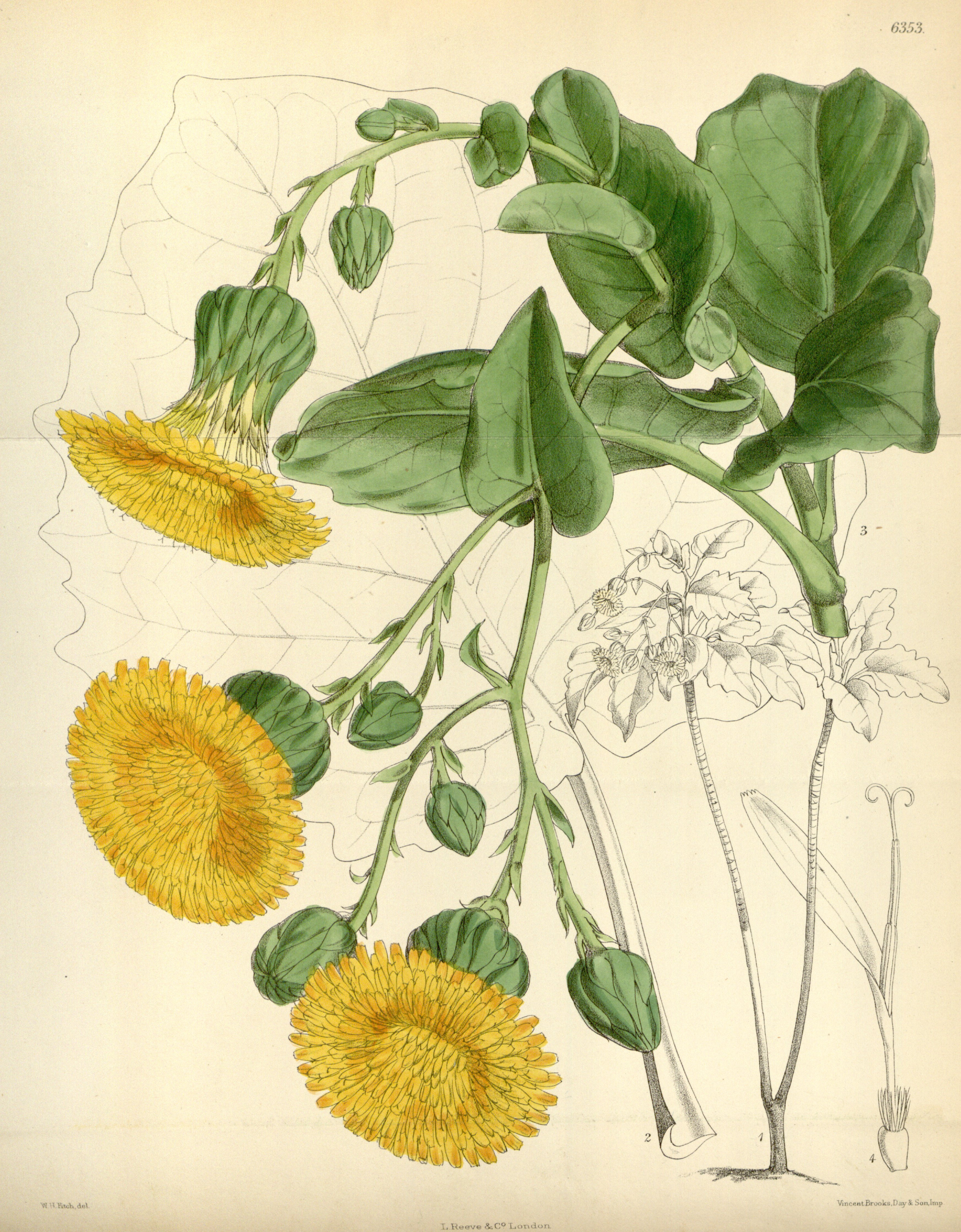 Dendroseris macrophylla in Curtis's Bot. Mag., tab 6353 - Islas de Juan Fernández, Oceano Pacífico, Chile.